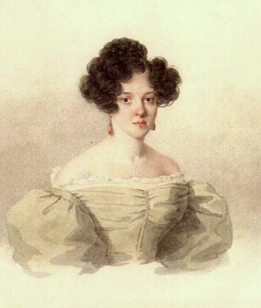 Варвара Аврамовна Рачинская, ур. Баратынская (1810—1891), сестра поэта.